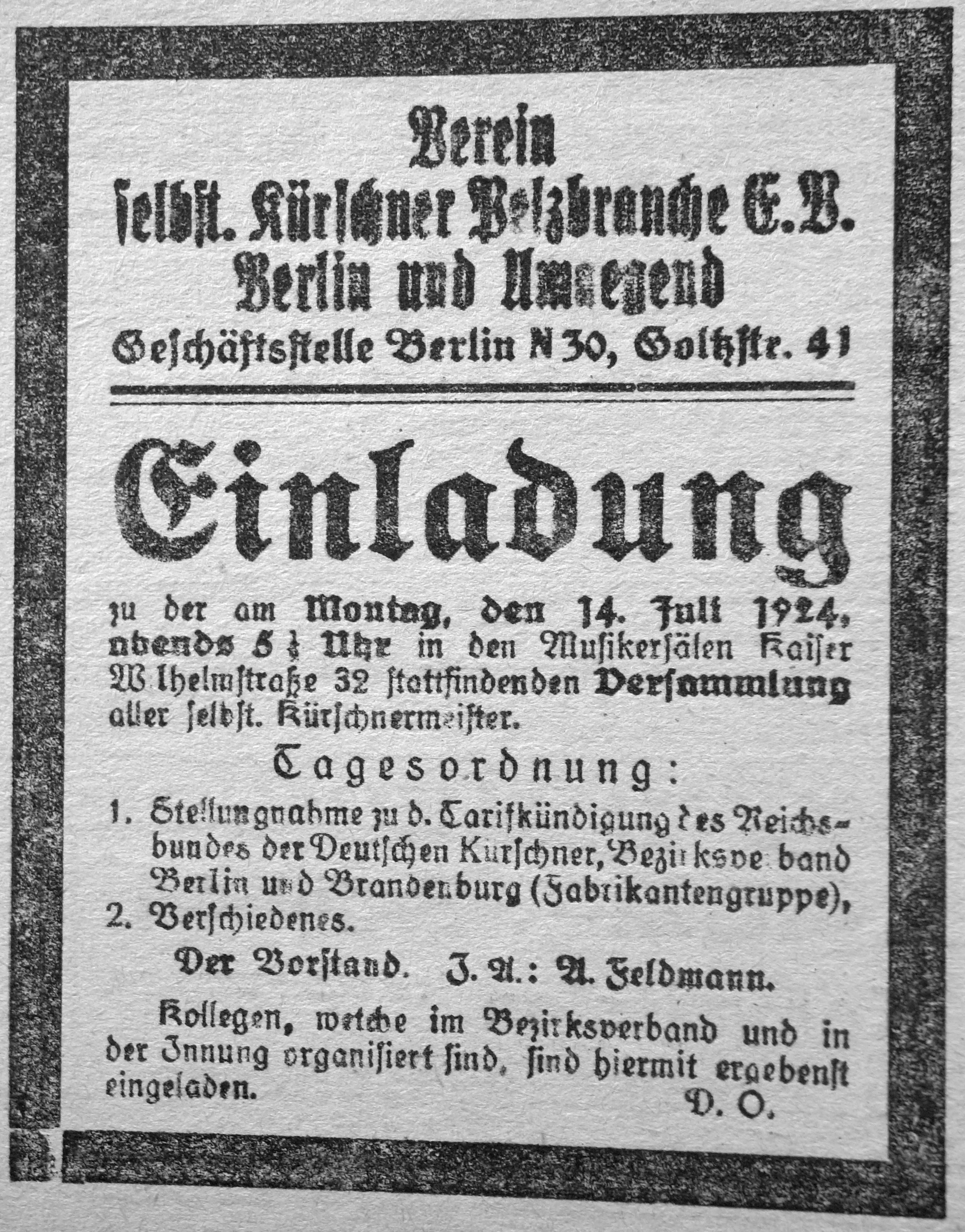 Verein selbst. Kürschner Pelzbranche e. V. Berlin und Umgegend. Einladung zum 14. Juli 1924.